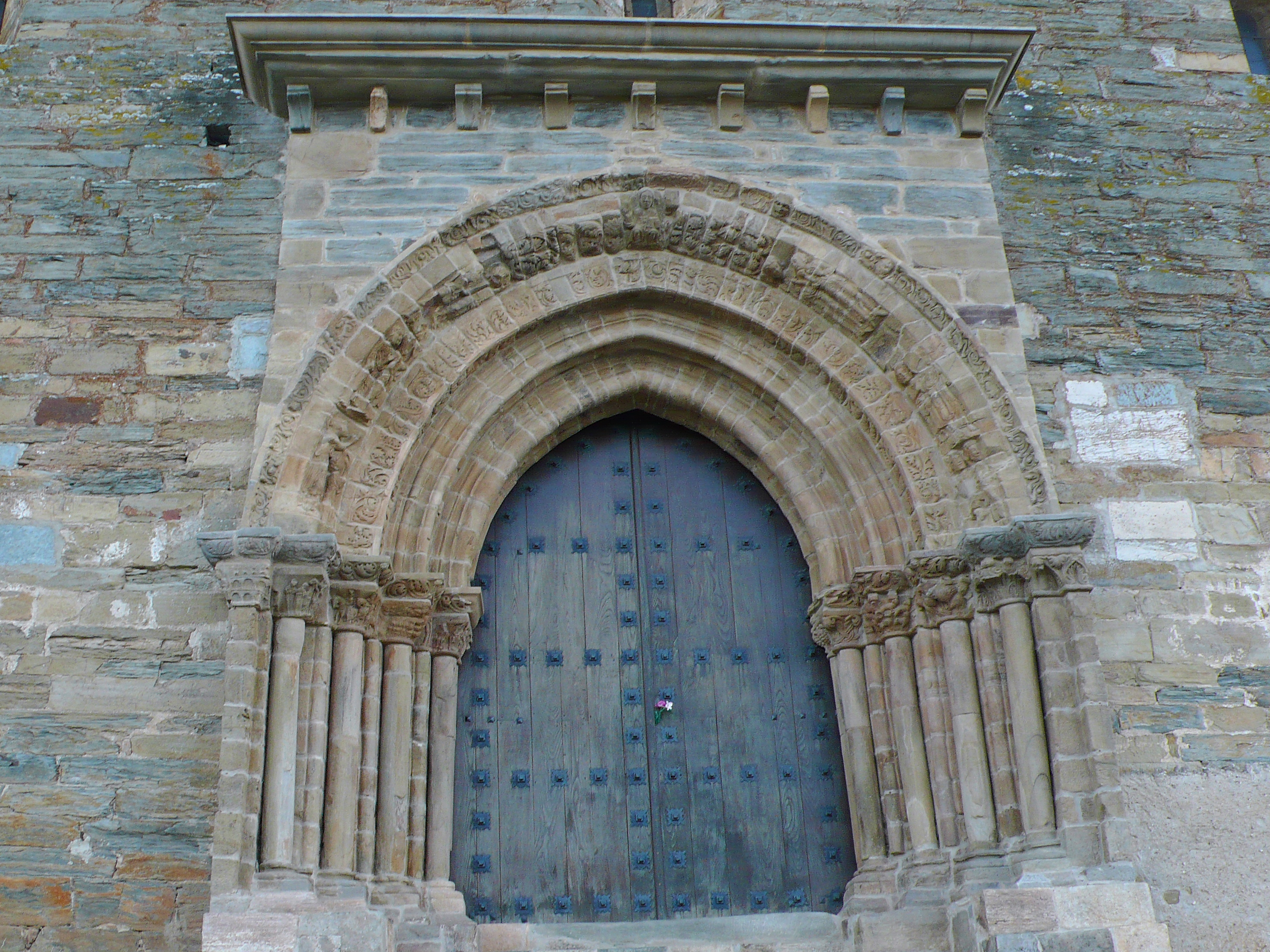 Iglesia de Santiago. Puerta septentrional de la iglesia, transición del arte románico al gótico (s. XIII). Famosa en el "Camino de Santiago" por disponer de privilegio jubilar por designación papal, para aquellos peregrinos que justificasen su imposibilidad de alcanzar Compostela. Su armonía y calidad de capiteles y arquivoltas, la destaca en el románico leonés.